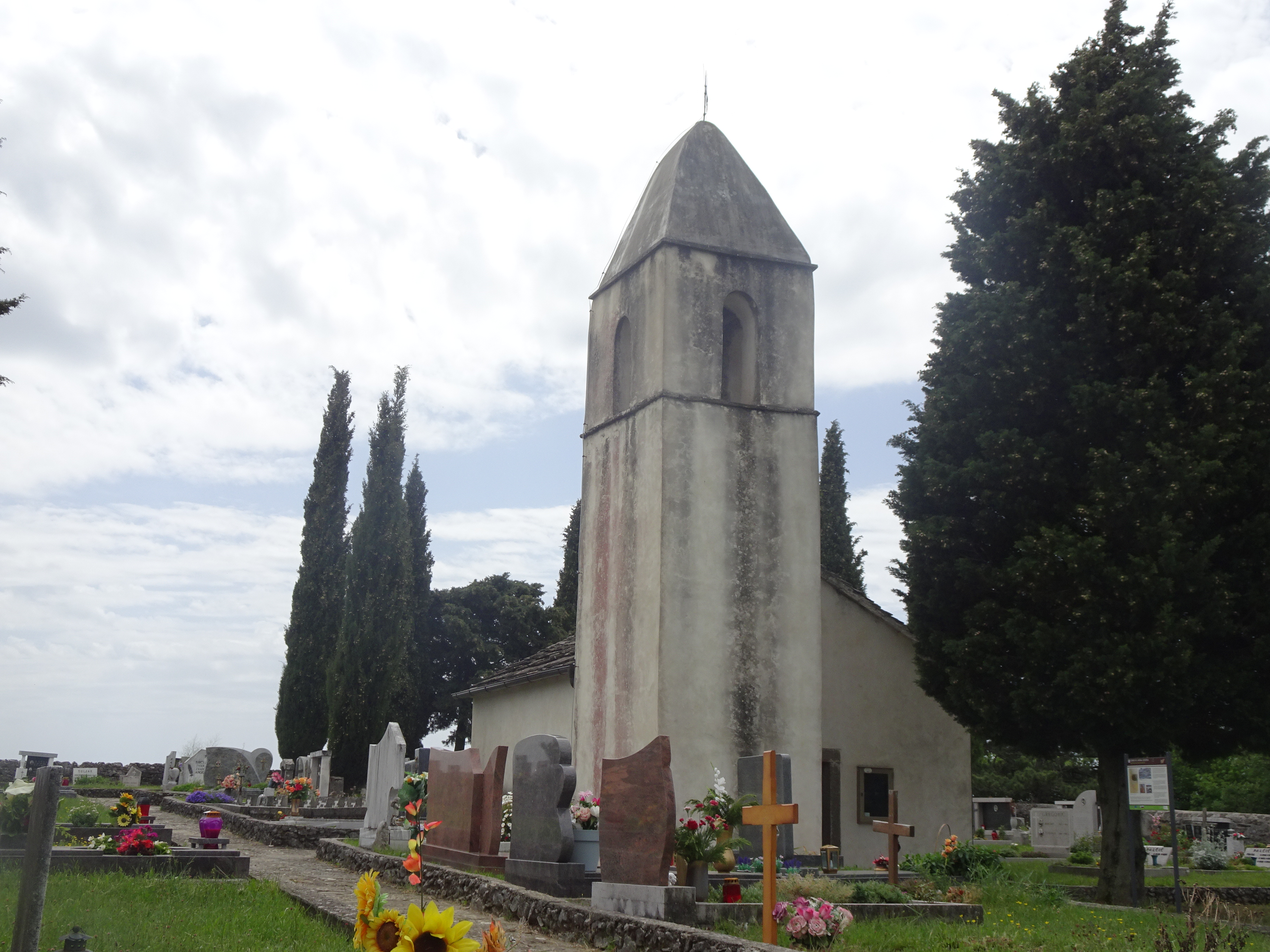 cerkev sv. Kvirika, Sočerga